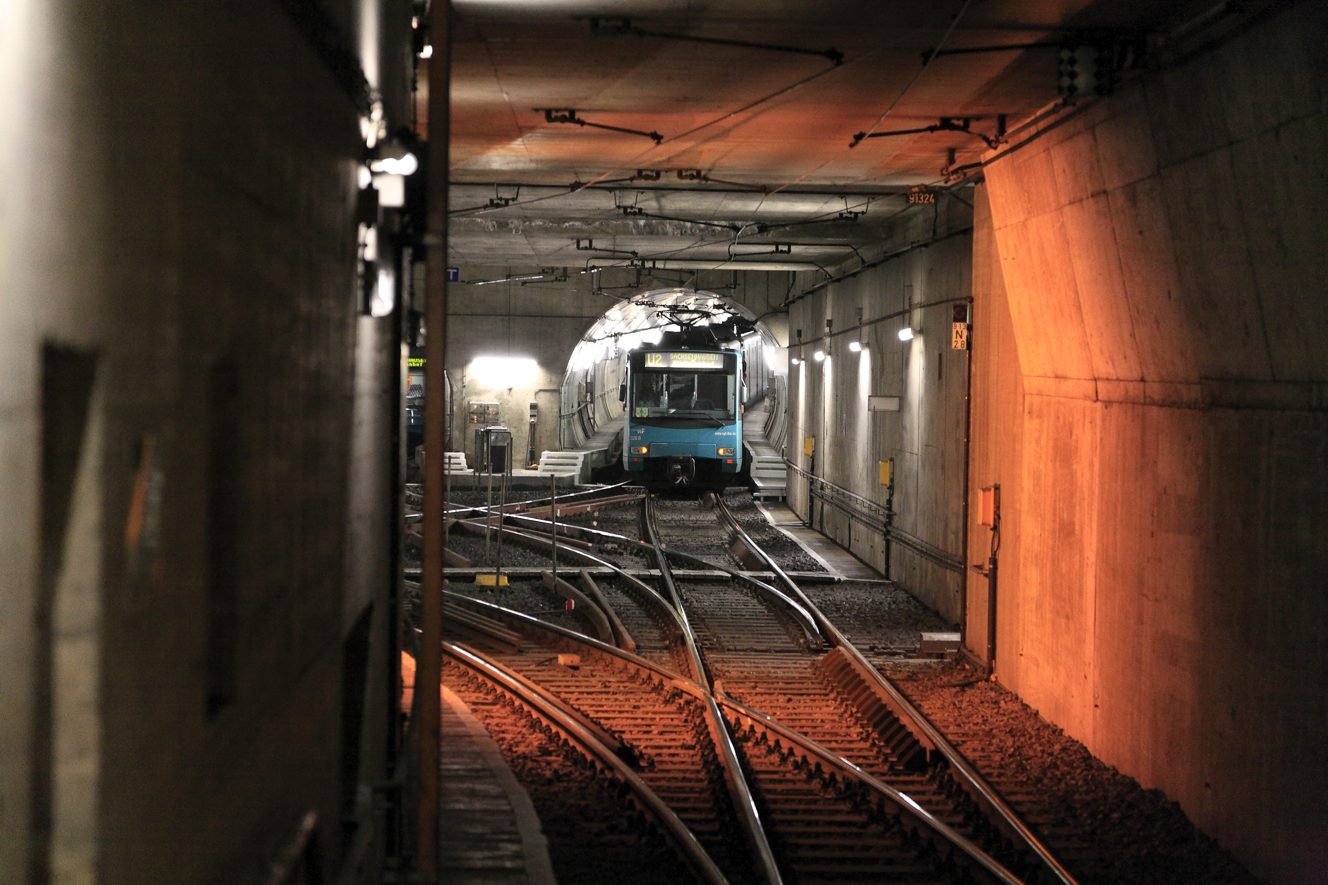 Die Kehranlage hat drei Kehrgleise, die jeweils in eigenen, mit einer Tunnelbohrmaschine aufgefahrenen Röhrentunneln liegen. Die Lage im Bogen lässt darauf schließen, dass es doch Pläne für einen Weiterbau gibt. Wegen der hier verkehrenden vier Linien ist die dreigleisige Kehranlage auch dringend nötig. Die Grundstrecke A spaltet sich im Norden in vier Streckenäste und eine Verbindungsstrecke auf. Der in das rechte Kehrgleis vorziehende Zug der VGF-Reihe U4 verkehrt auf der Linie U2 und kommt von Bad Hommburg-Gonzenheim.